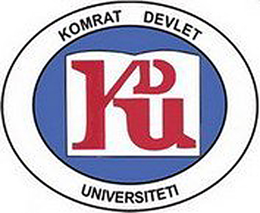 Комратский государственный университет